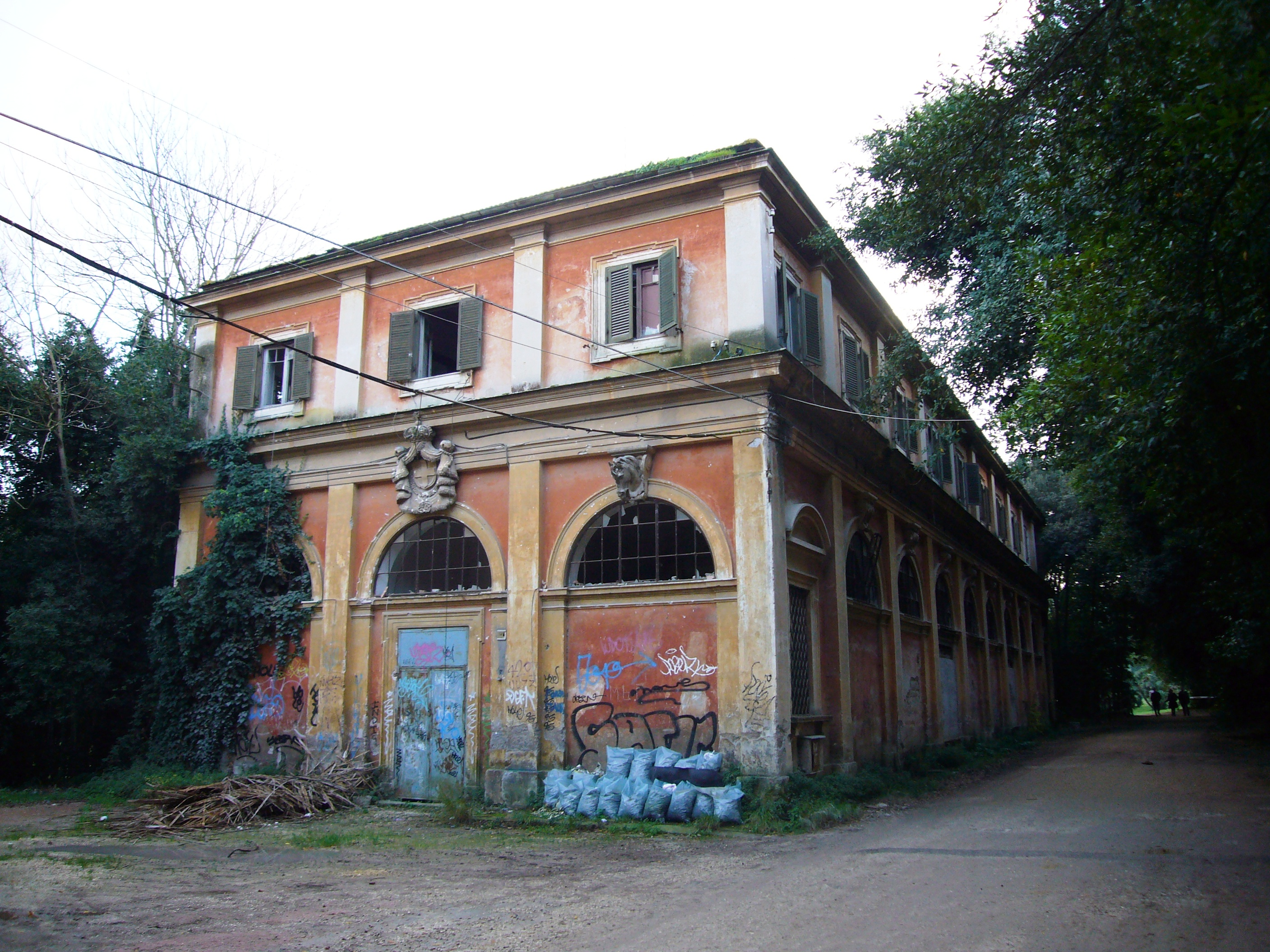 Roma, Villa Ada: scuderie dei Savoia